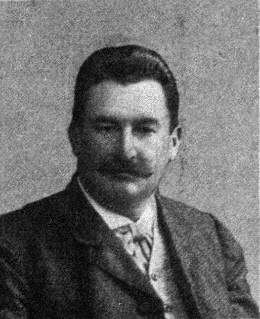 Österreichischer Politiker, Reichsratswahl 1907, Name siehe Dateiname